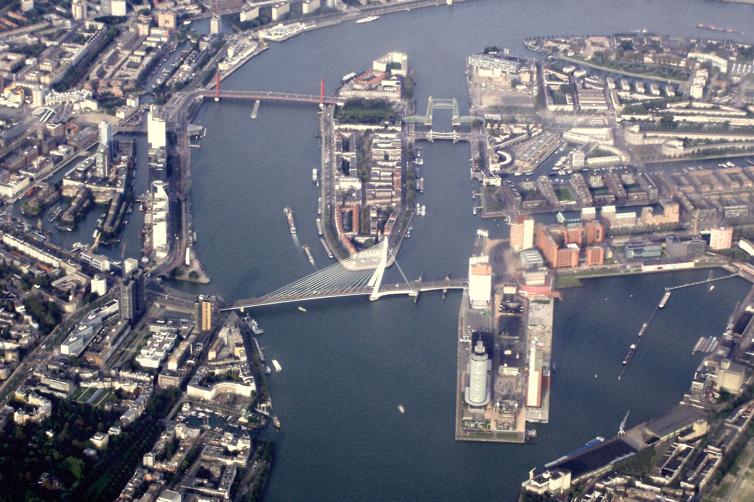 Categorie:Luchtfoto Categorie:Lucht-satelietfoto Rotterdam (Original text: Luchfoto van Rotterdam / Erasmusbrug / Kop van Zuid)